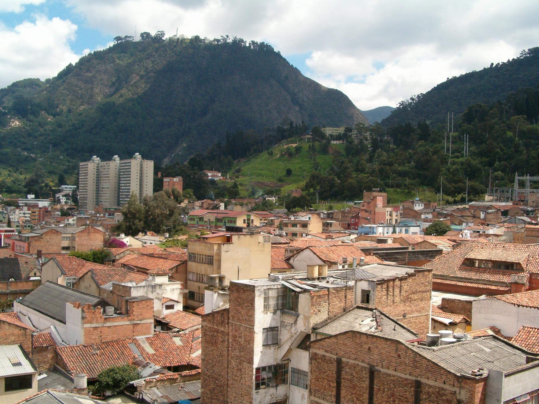 Fotografía del centro de Bogotá. Localidades Candelaria y Santafé. Desde la altura de un tercer piso en una construcción colonial. Autor: Nelson Lammoglia Fotografía de mi archivo personal